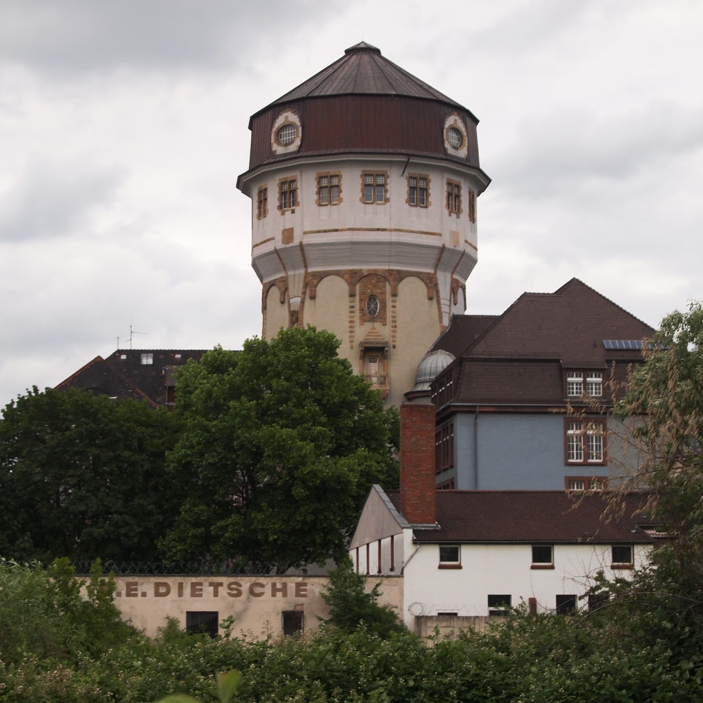 Wasserturm Luzenberg in Mannheim von der Musikinsel her gesehen